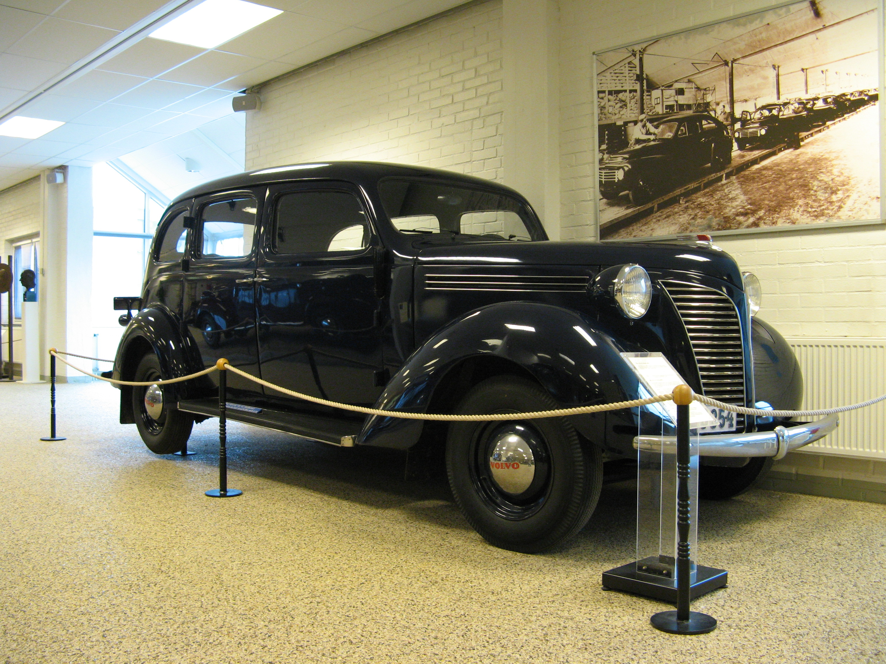 Volvo TR802 Taxi (1938)